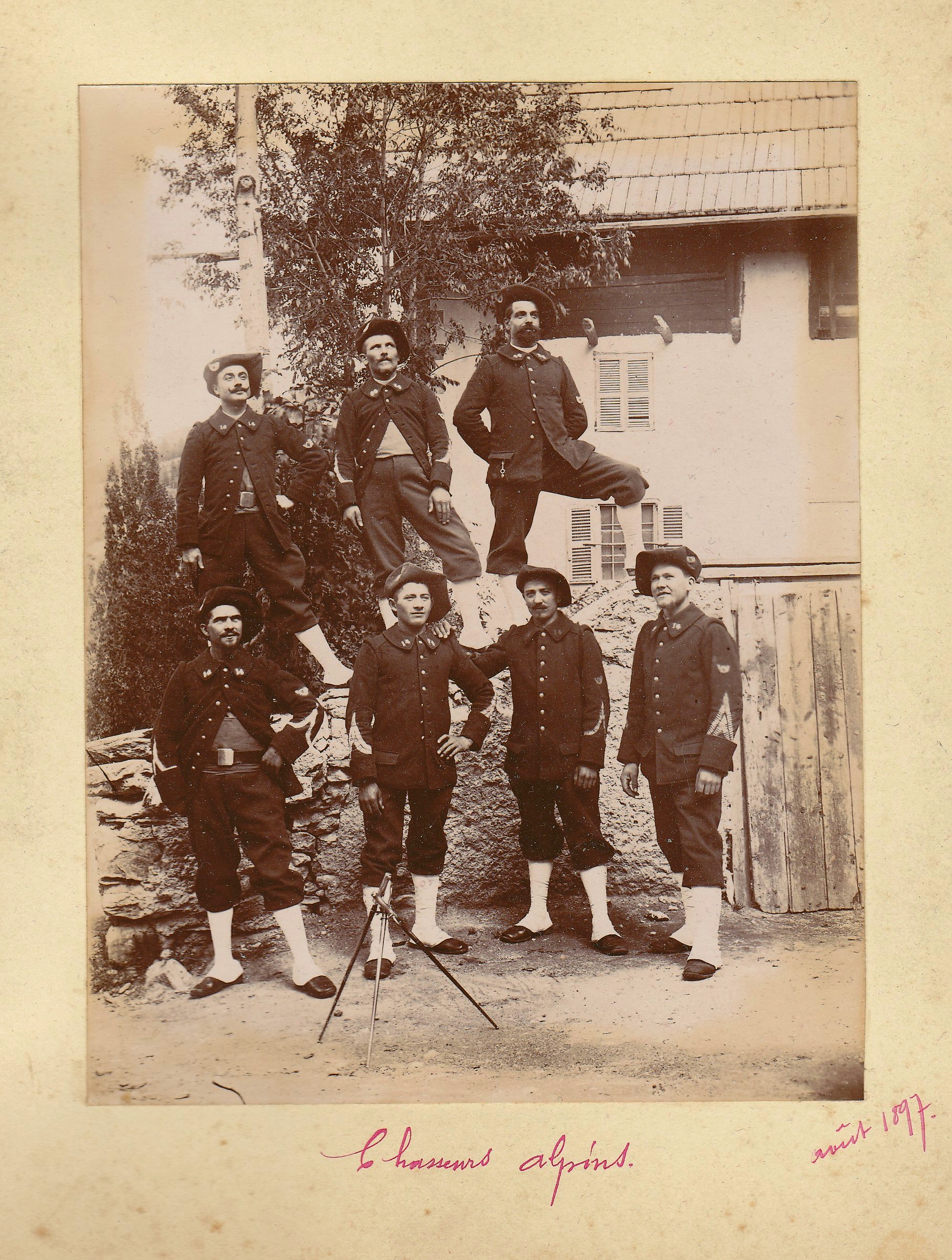 Photographie, papier albuminé 16 x 12,5 cm. Un groupe de chasseurs alpin en août 1897, 14ème bataillon, location et photographe indéterminés. Collection privée.